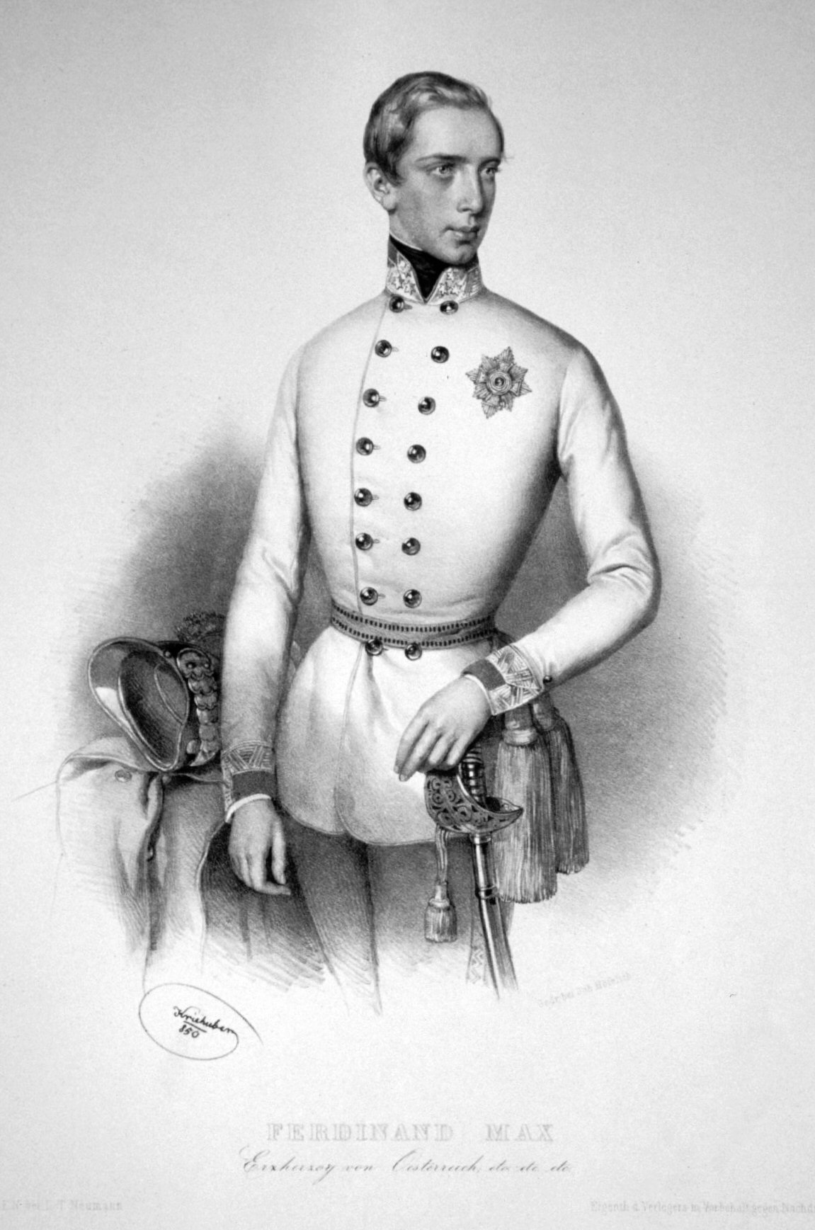 Ferdinand Maximilian von Österreich, Maximilian I. von Mexiko (1832-1867), Lithographie von Josef Kriehuber, 1850